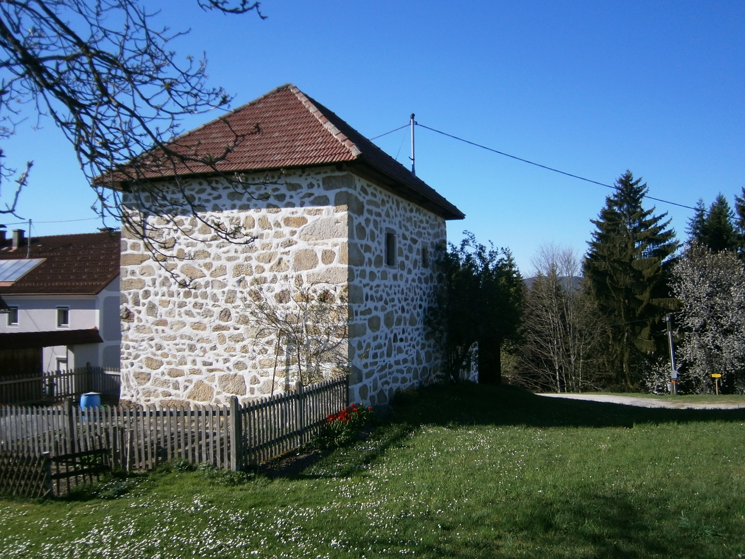 Object location48° 26′ 09.18″ N, 14° 39′ 42.97″ E